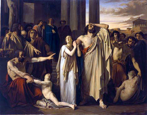 Edipo y Antígona destarrados de Tebas